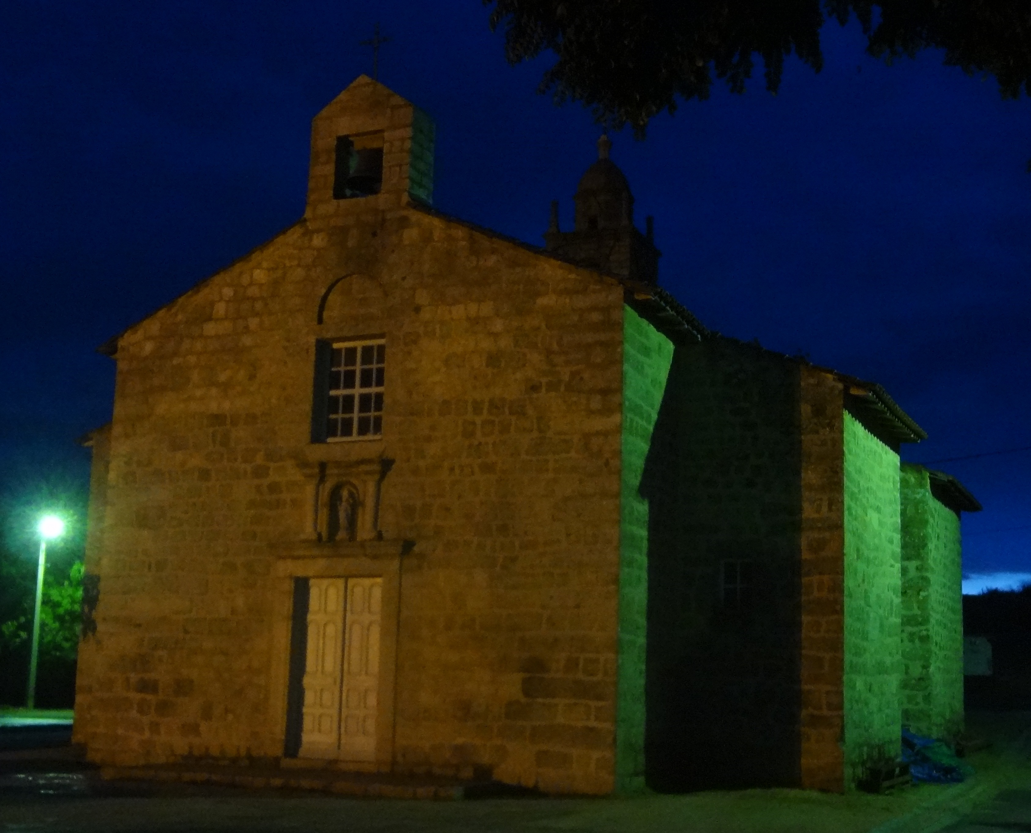 Église Saint-Nicolas d'Aullène, Corse (Inscrit, 1990) .